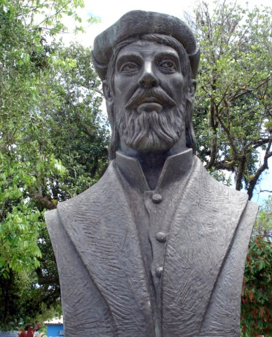 Pero do Campo Tourinho, capitão donatário português de Porto Seguro. See also